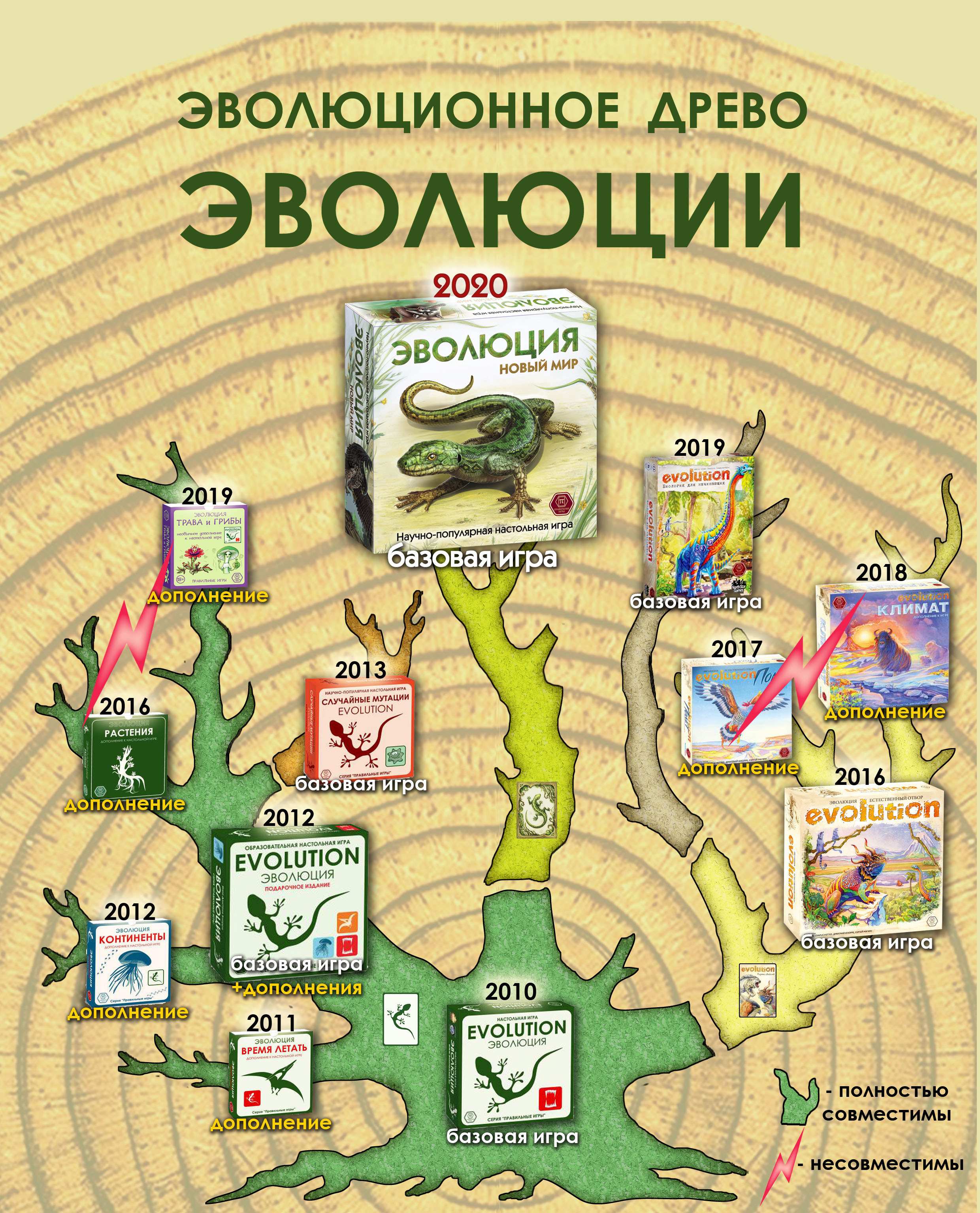 Эволюционное древо игр серии Эволюция